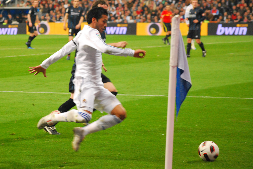 Real Madrid 4 - Real Sociedad 1 6 de febrero de 2011 La Liga